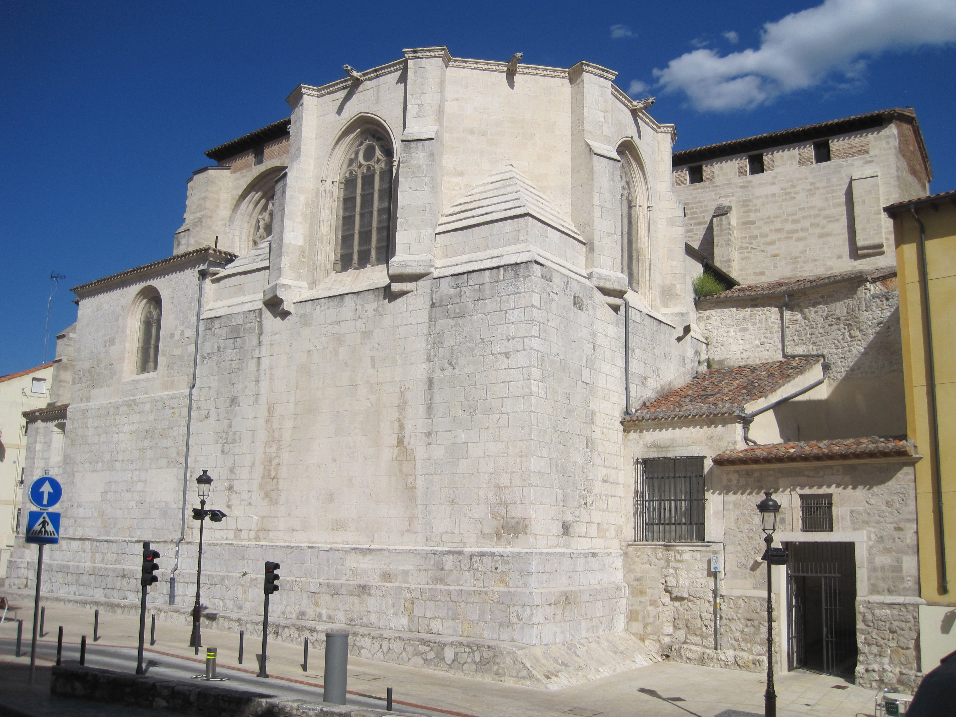 Vista lateral norte de la iglesia de San Gil Abad de Burgos, como una parte más de la muralla.